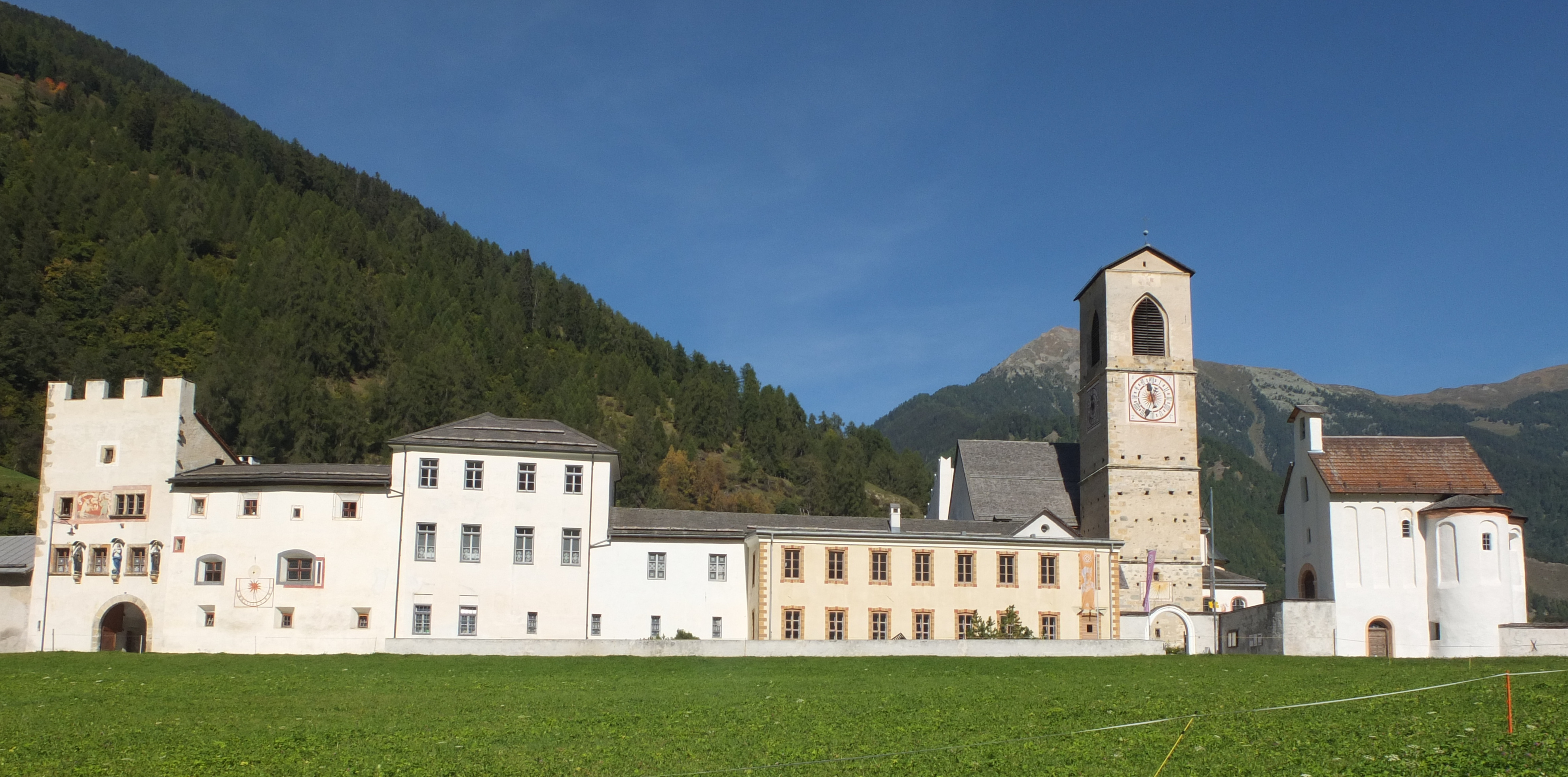 Benediktinerinnenkloster St. Johann, Gesamtansicht